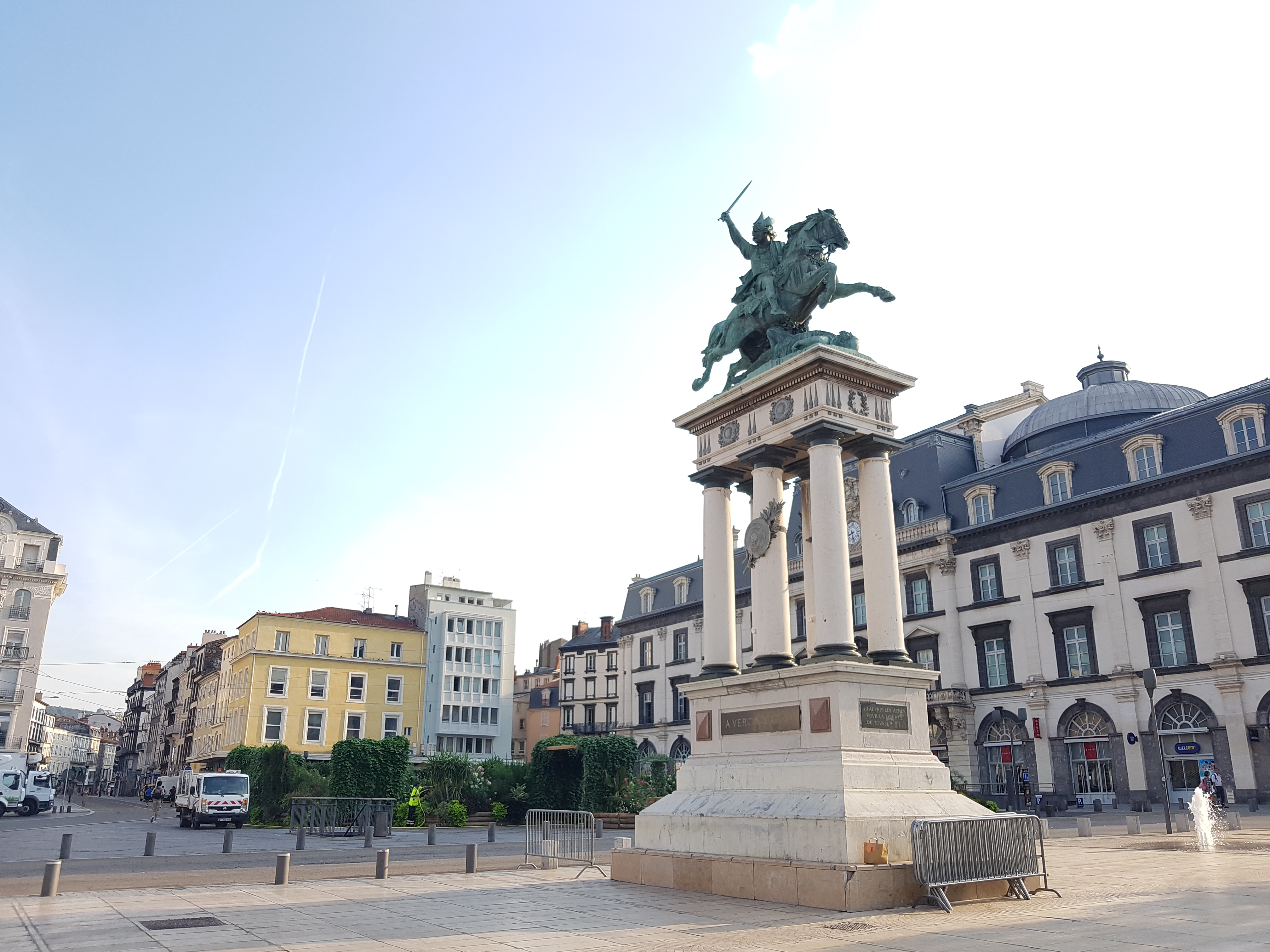 Place de Jaude